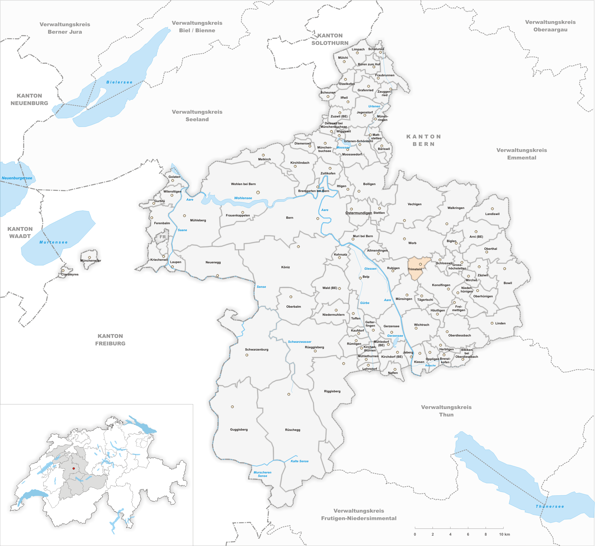 Municipality Trimstein